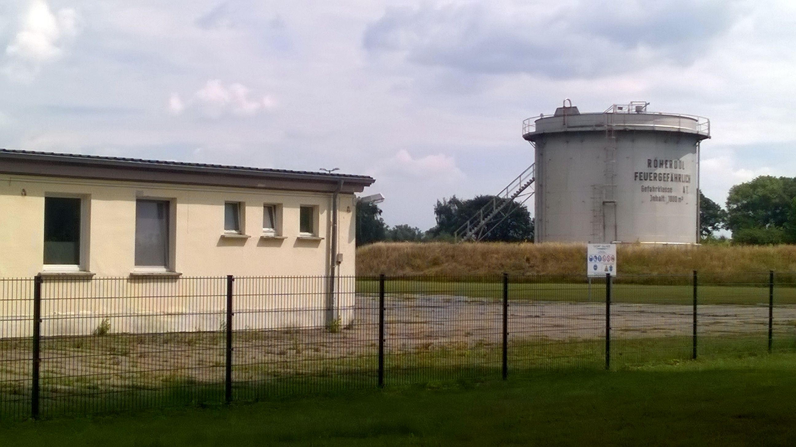 Rohöl-Hochtank und Werkstattgebäude der ehemaligen Feldzentrale Lütow des VEB Erdöl-Erdgas Grimmen (2016)